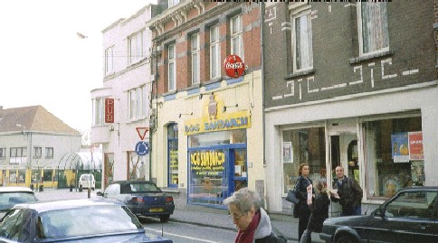 vido de Muskrono, persona foto senkopirajta